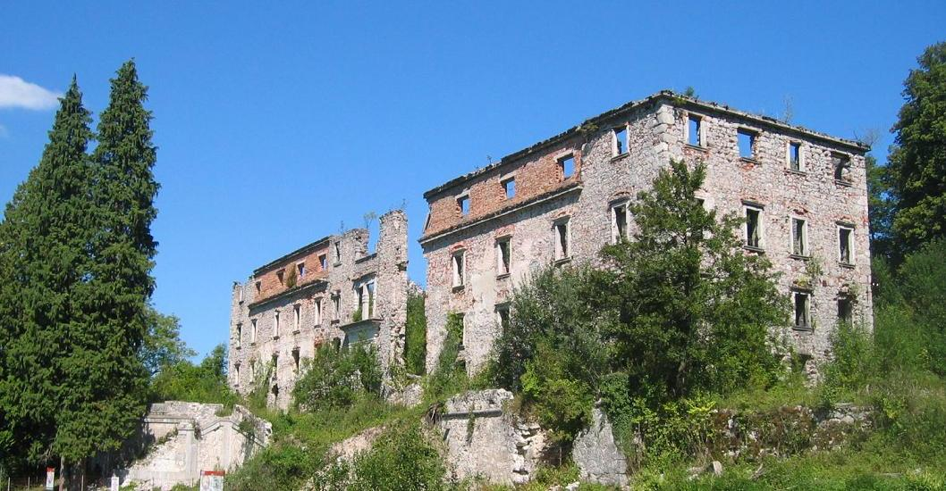 Grad Hošperk (Hošperk, also Haasberg castle) near Planina pri Rakeku, Slovenia - burned down in 1944. photo:Ziga 19:54, 10 September 2006 (UTC)